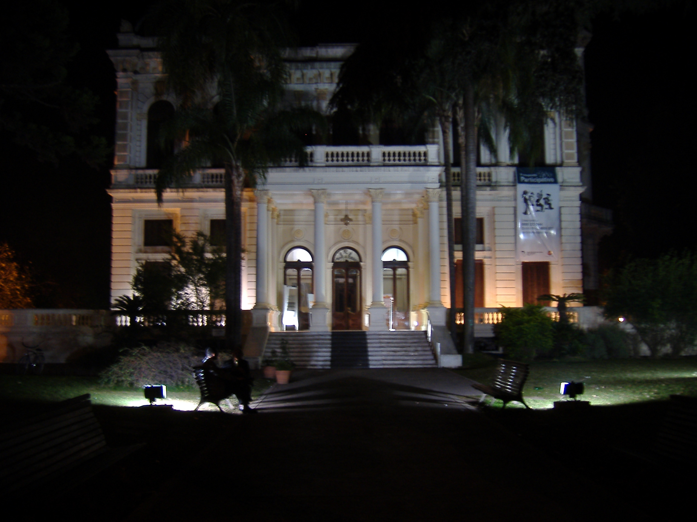 Villa Hortensia, an old mansion in Barrio Alberdi, Rosario, Argentina.